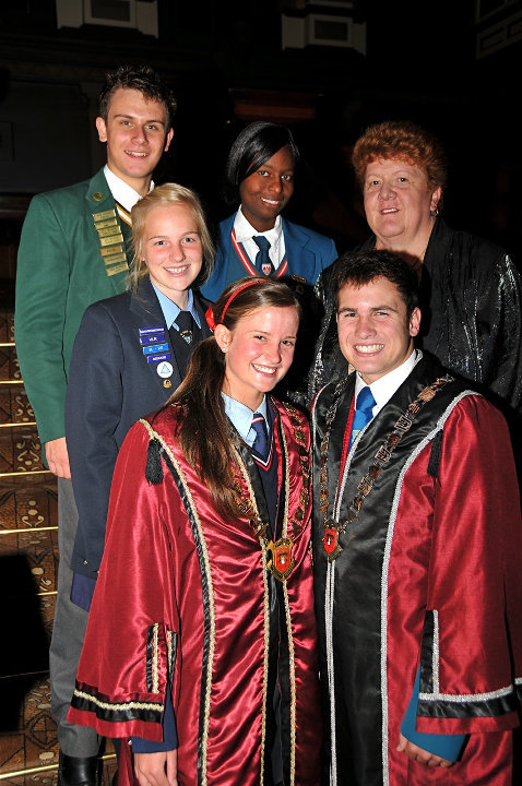 Die amp van 2010/2011 en opsigter (Mev. Linda Oberholzer) van die Junior Stadsraad van Pretoria